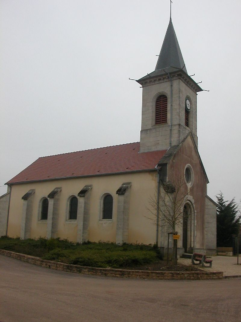 Eglise de SAUSSY 21